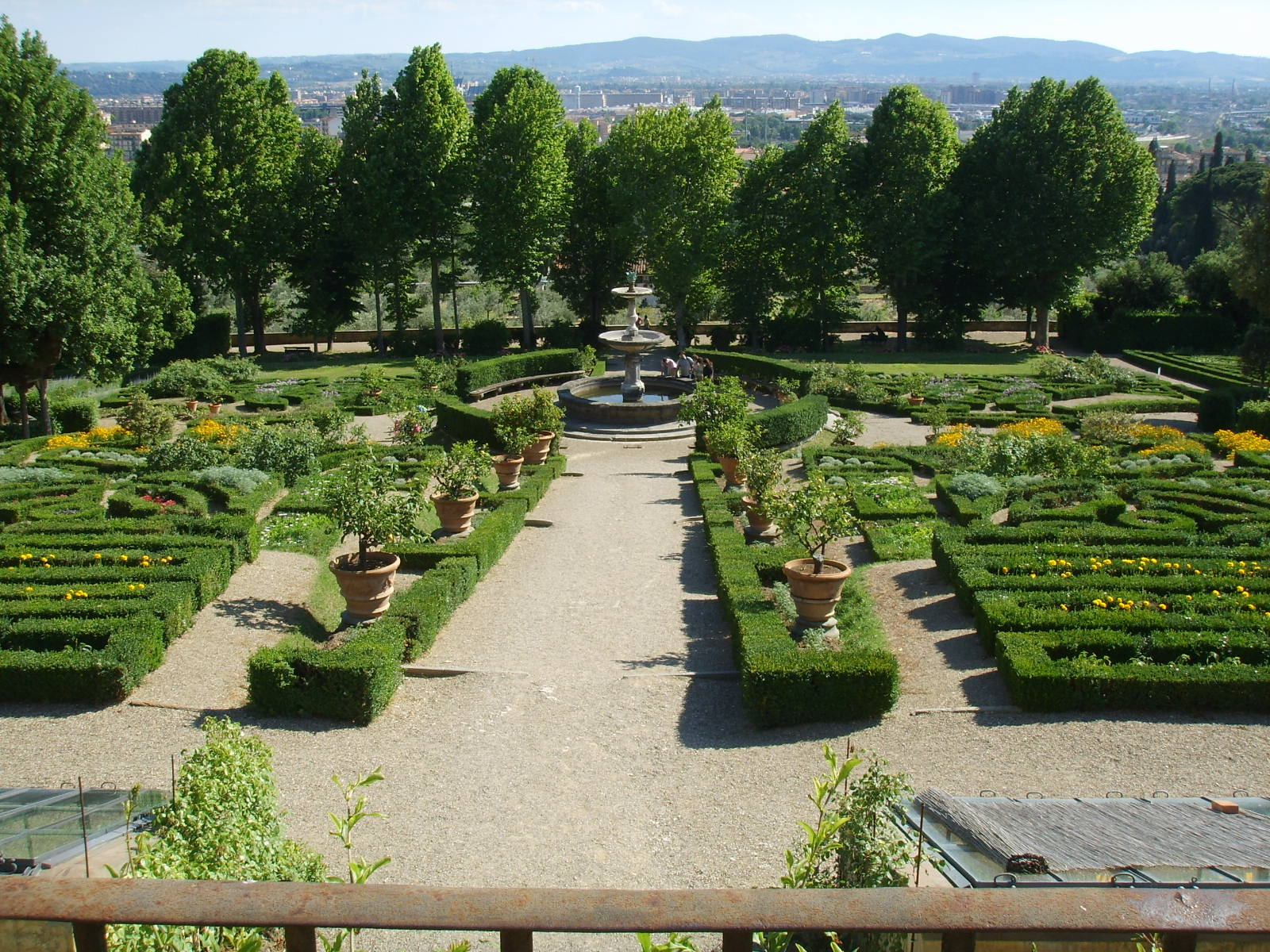 Villa La Petraia gardens, Florence, Italy